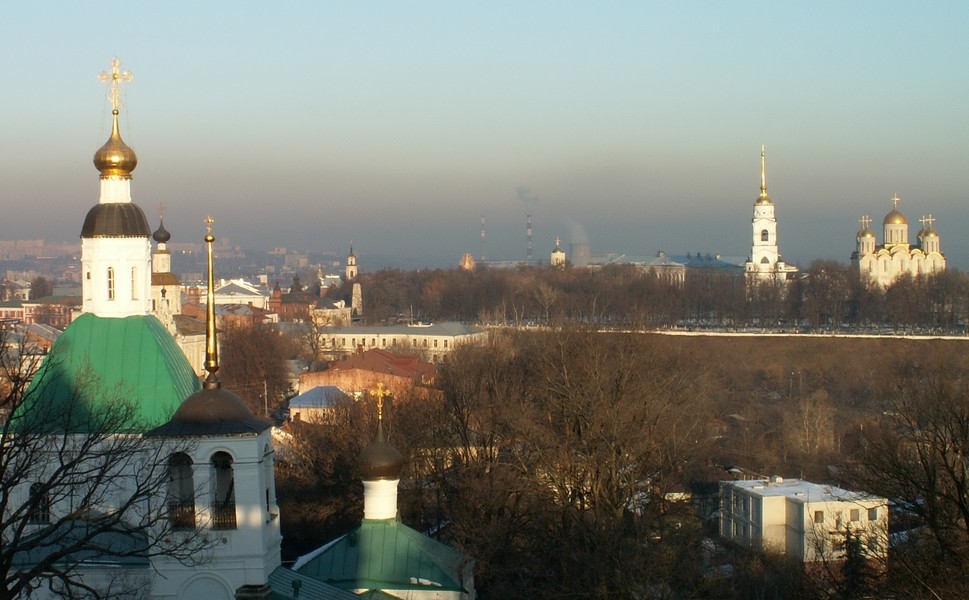 Панорама Успенского собора